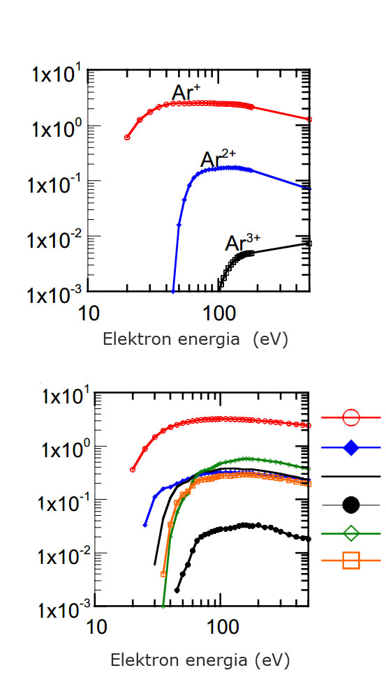 Ion km